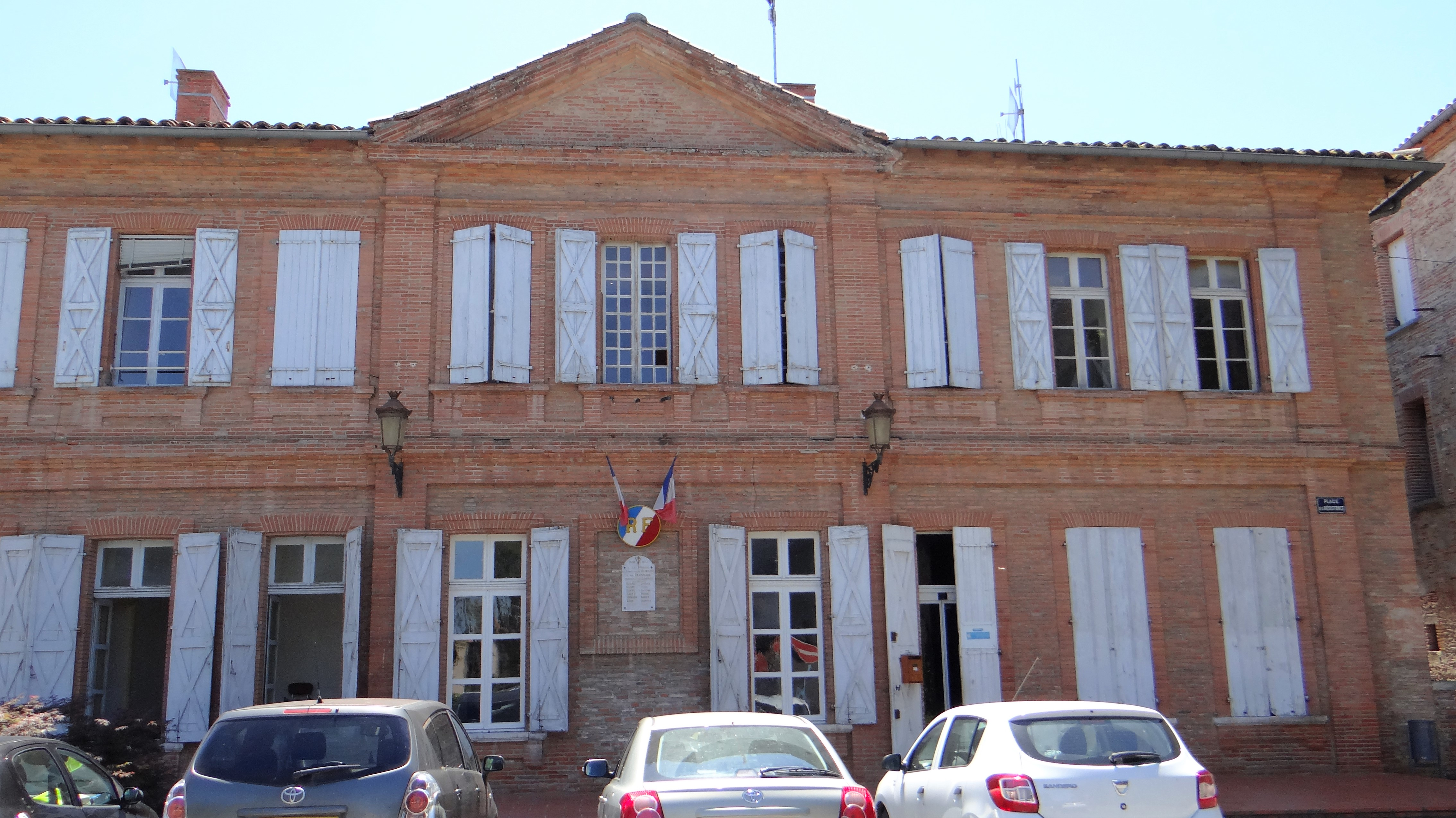 Lavaur (Tarn) - Ancienne mairie, place de la Résistance